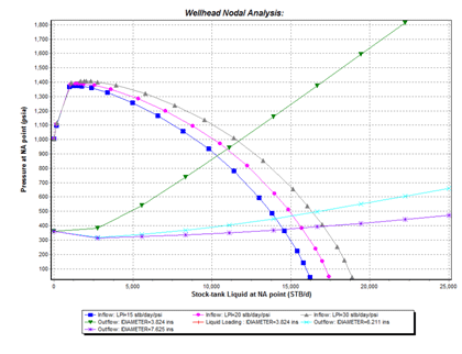 نرم افزار pipesim